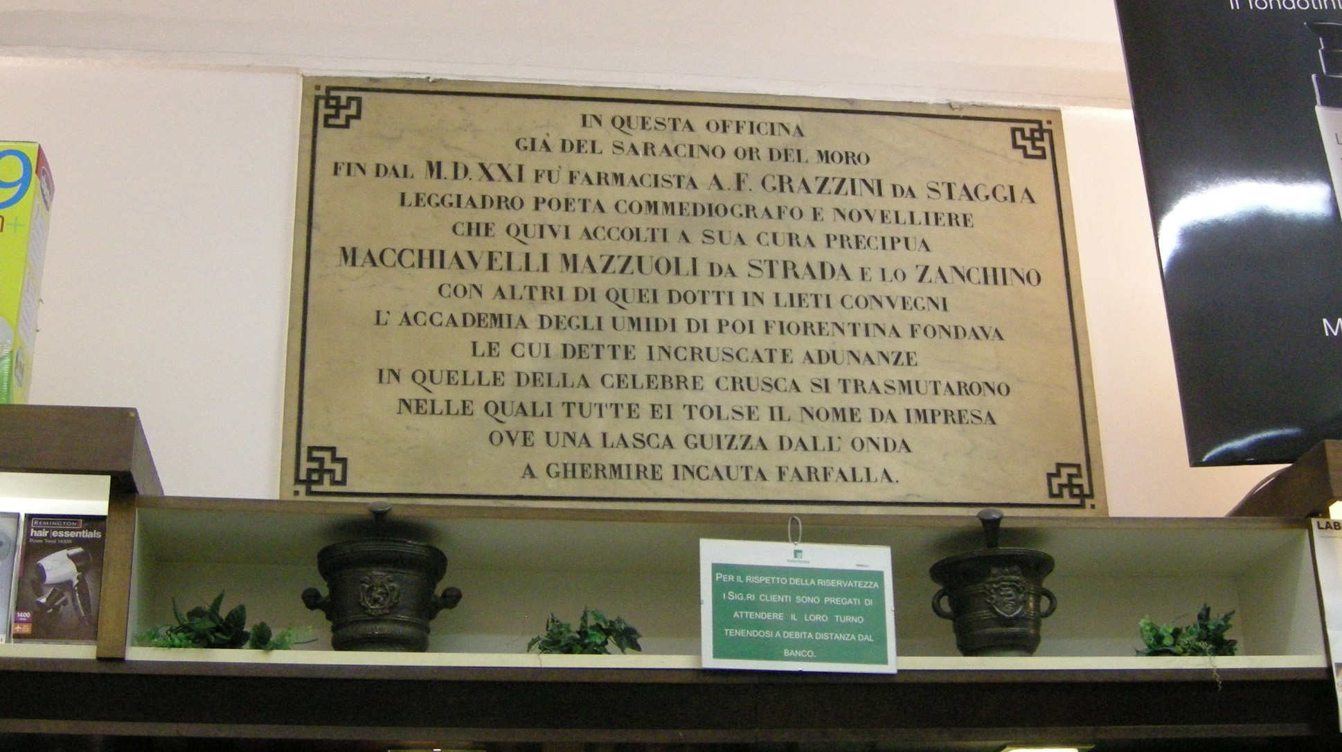 Lapide farmacia del saracino o del moro